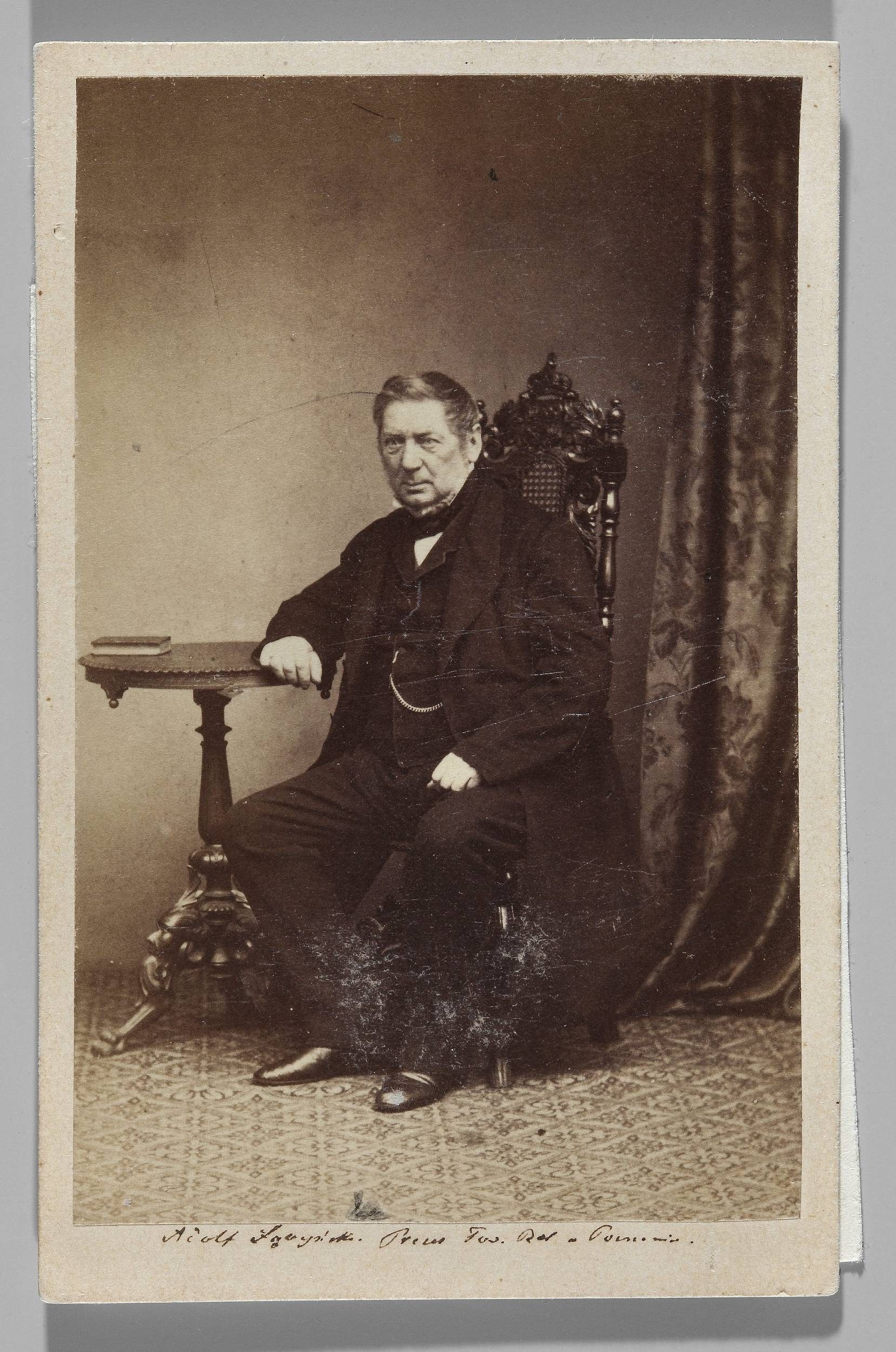 Fotografia Adolfa Łączyńskiego. Fotografię posiada Muzeum Narodowe w Warszawie.